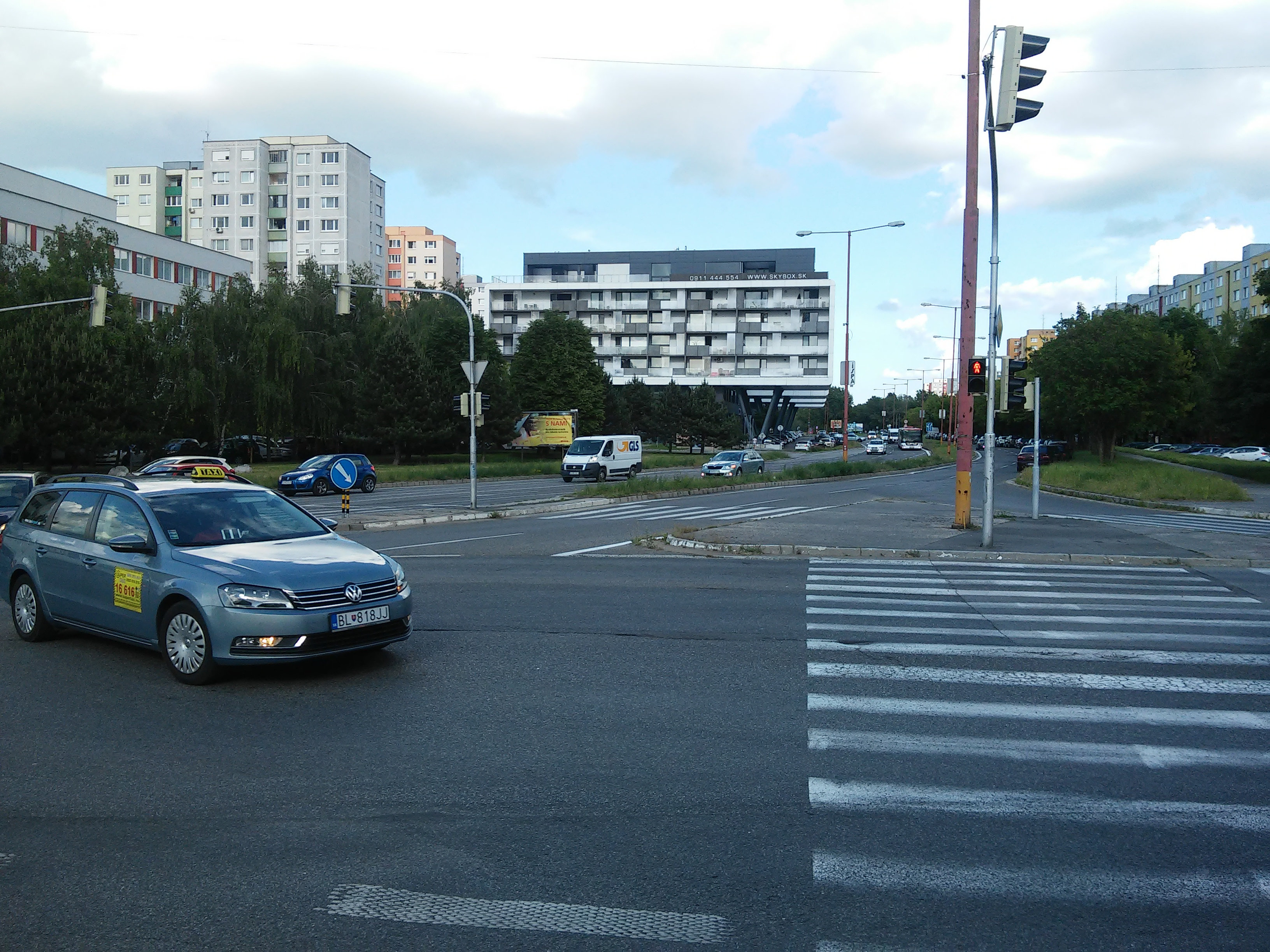 Pajštúnska, Petržalka, Bratislava